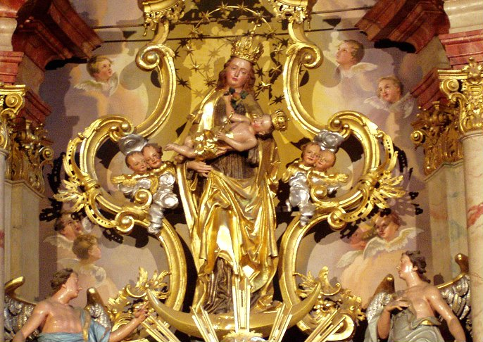 Hochaltar der Wallfahrtskirche Maria Scharten - Unsere Liebe Frau von der Scharten